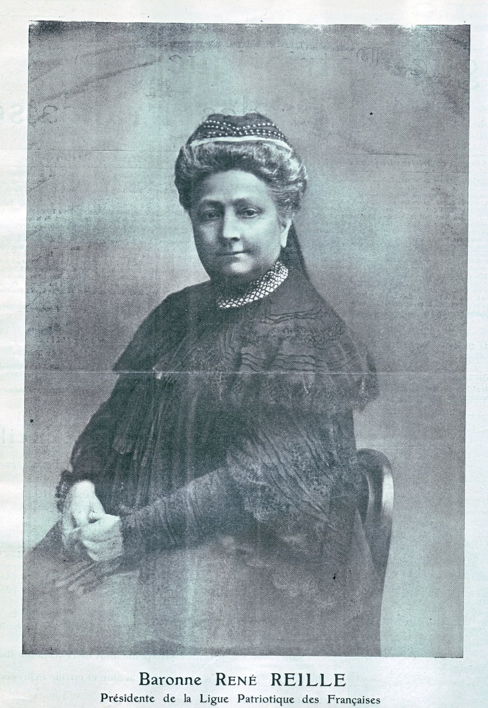 Geneviève Soult de Dalmatie (1844-1910), baronne René Reille, présidente de la Ligue patriotique des française